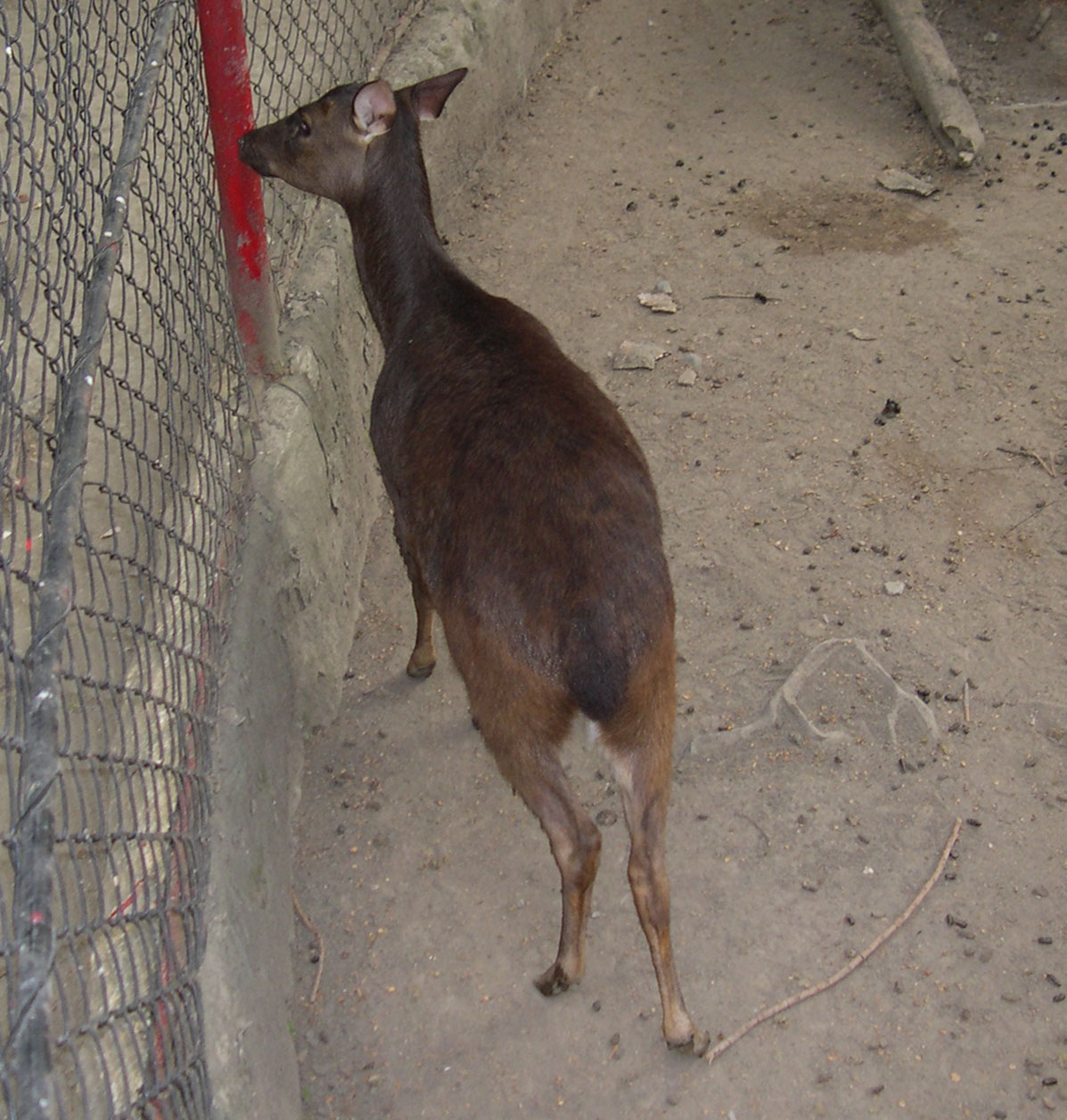 Philippine Deer (Cervus Mariannus) in Manila, Philippines